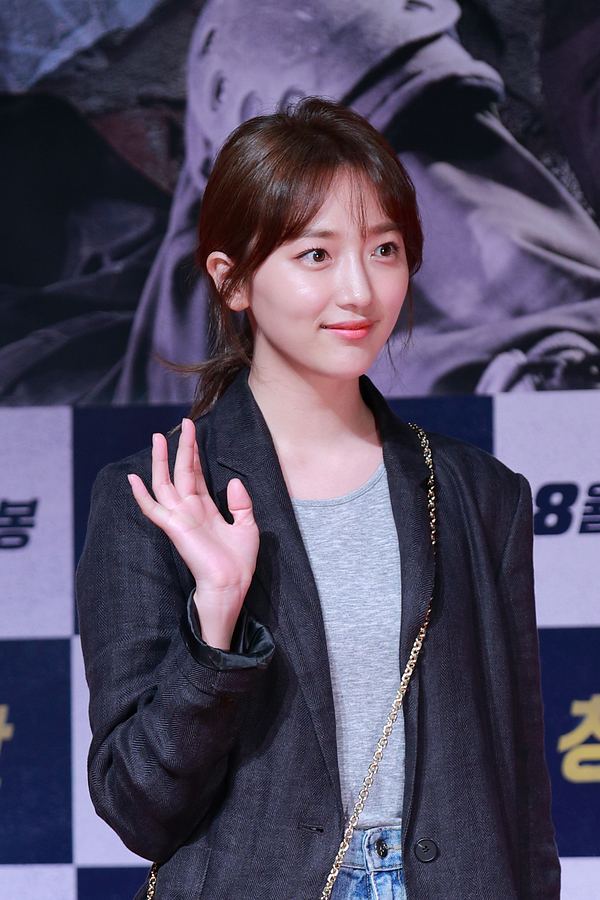 170807 청년경찰 VIP 시사회